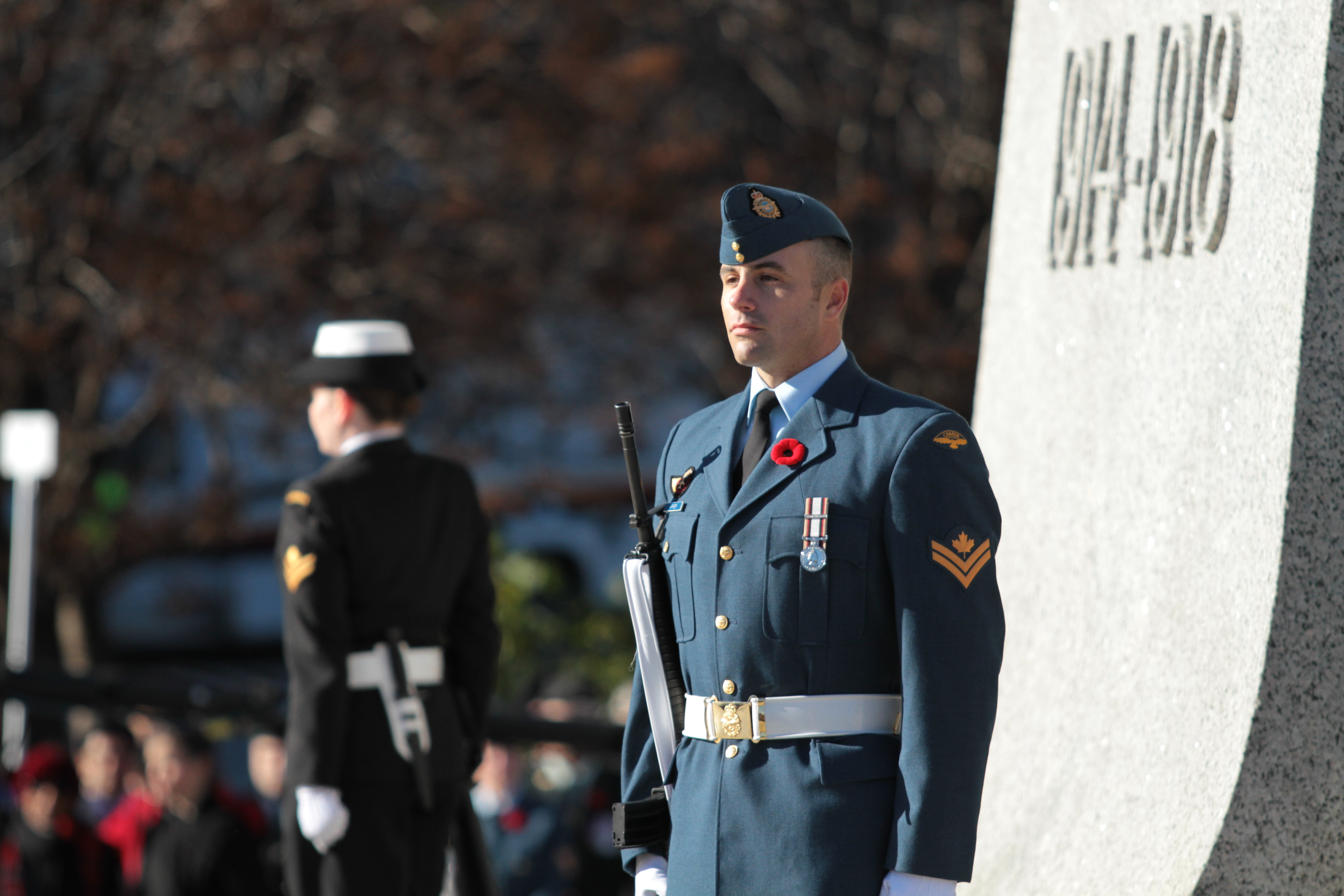 Ottawa | 11/11/10 Photo : Greg Kolz